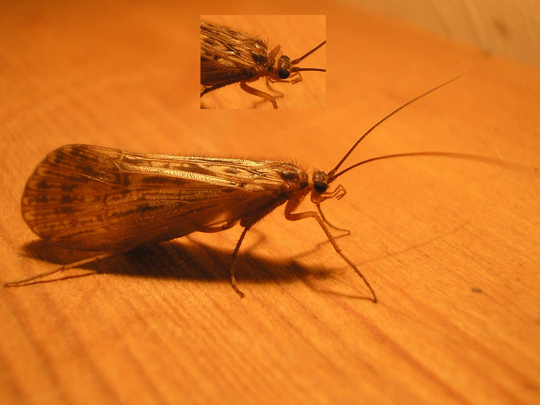 Some species of Caddisfly (Halesus cf. tesselatus) Location: Soderstorf (Lüneburger Heide), Germany Keywords: trichoptera, caddisfly --- nl: Eén of andere Schietmot Locatie: Soderstorf (Lüneburger Heide), Duitsland Trefwoorden: schietmot, kokerjuffer --- de: Irgendeine Art Köcherfliege